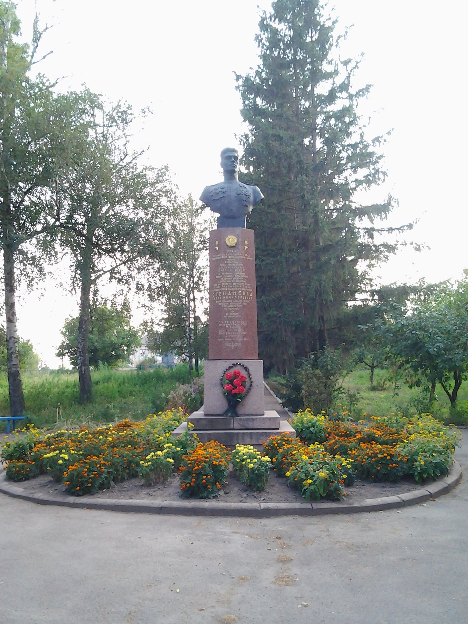 Бронзовий бюст Двічі Герою Радянського Союзу льотчику І.Н. Степаненку, встановлений в його рідному с. Нехайки, Драбівського р-ну, Черкаської обл., Україна